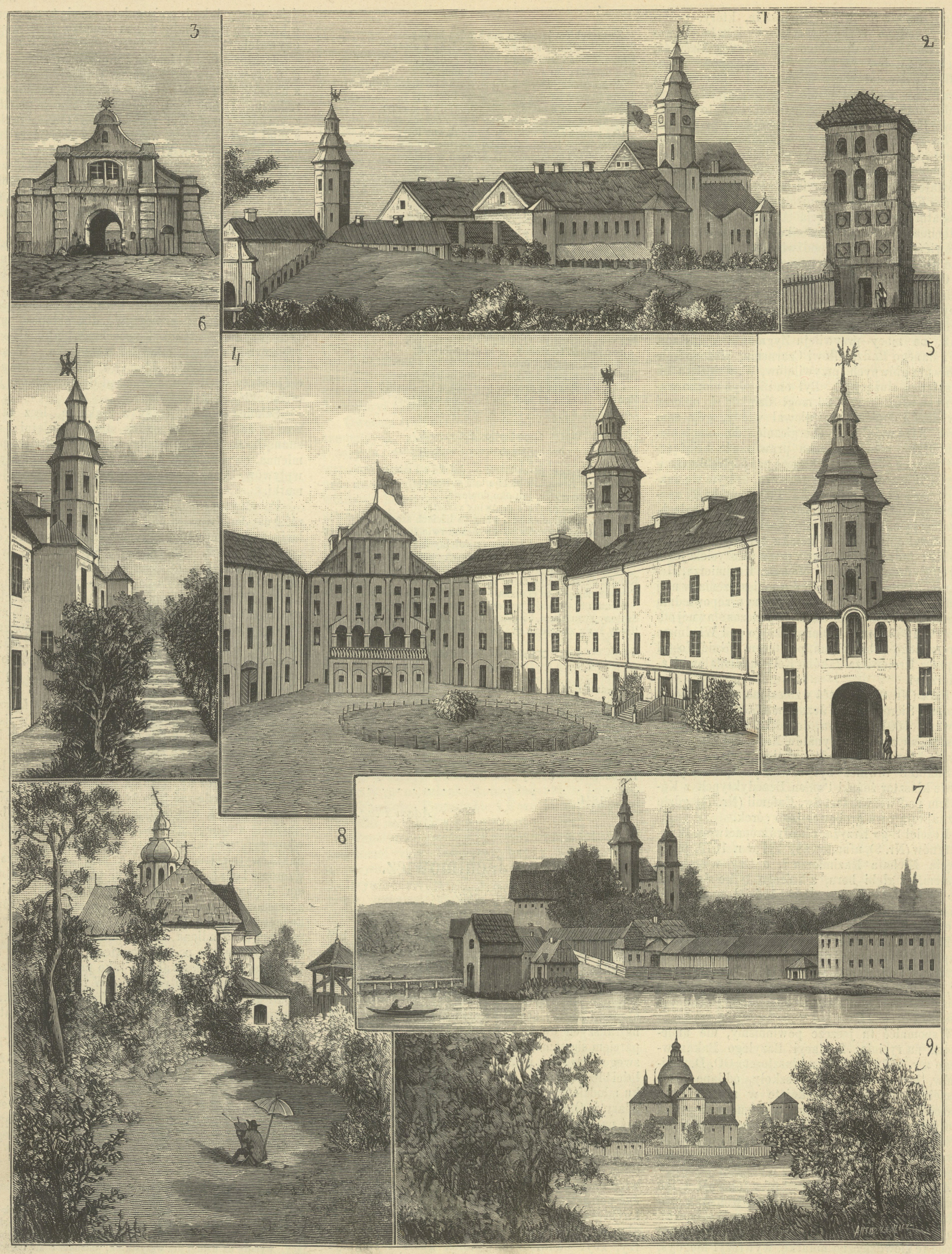 Беларуская (тарашкевіца): Нясьвіж (Niaśviž)